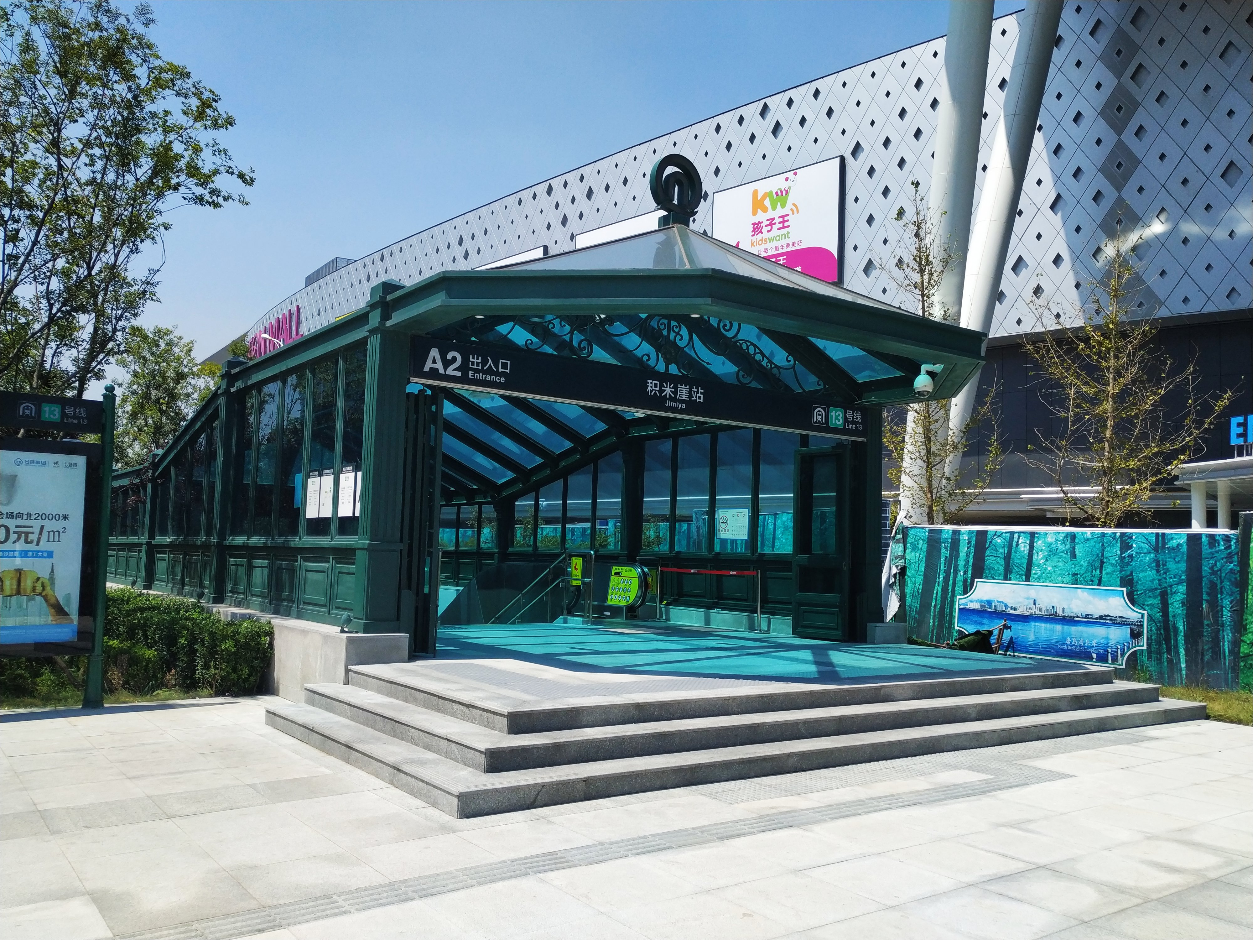 中文（中国大陆）: 青岛地铁积米崖站